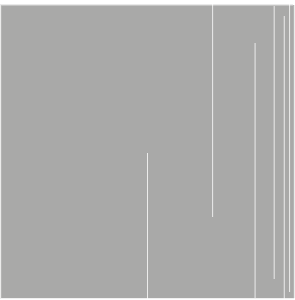 Obszar, którego część brzegu składa się z punktów niedostępnych, tzn. nie istnieje łuk łączący taki punkt z jakimkolwiek punktem obszaru.